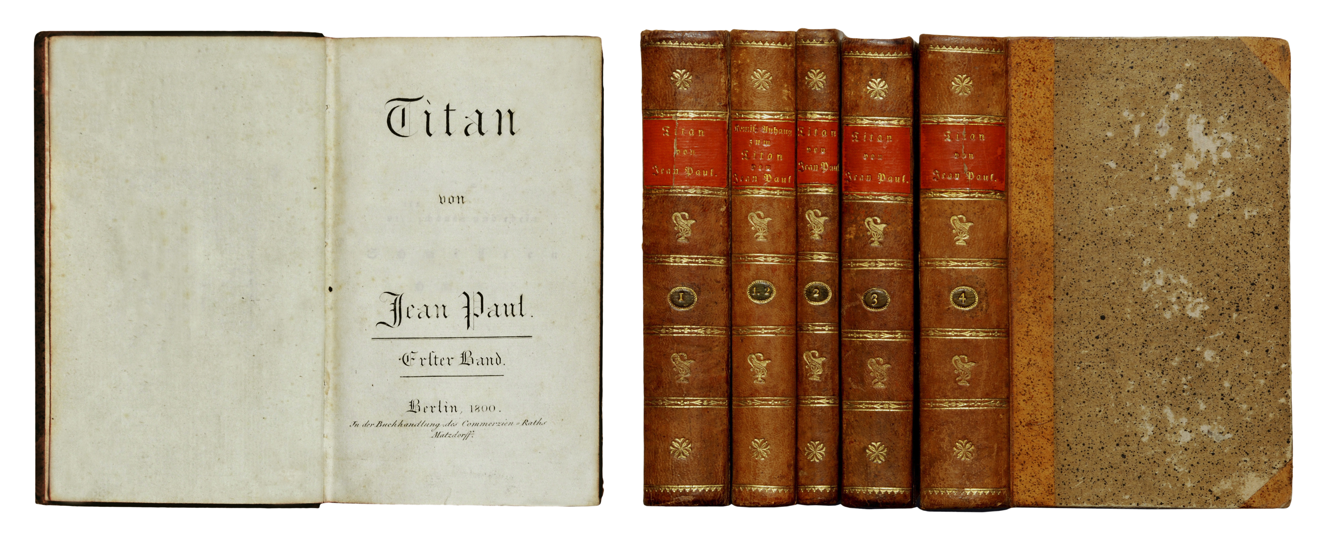 Jean Paul [eigtl. Paul Friedrich Richter]: Titan. Roman. [4 Bde.] + Komischer Anhang zum Titan [2 Bde. in 1] Berlin: Matzdorff 1800 - 1803, gestochener Titel. Erstausgabe (Wilpert/Gühring² 17) Vorderdeckel 176 x 103 mm; rotes Rückenschild mit Autor und Titel in Goldprägung; klassizistischer Rückenschmuck in Goldprägung; Unterteilung des Rückens durch Querbänder in Gold; in den einzelnen Feldern zweimal eine antike Kanne, um die sich eine Schlange windet, zweimal ein Stern und ein rundes Rückenschild mit der Bandzahl